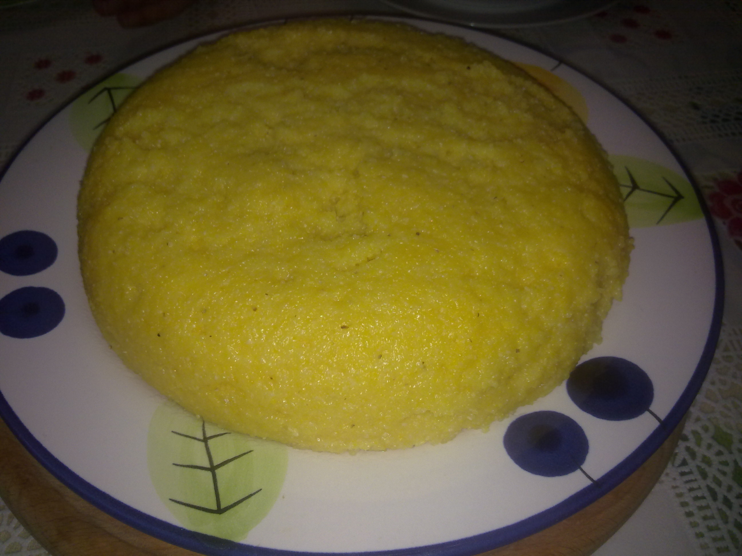 Mamaliga bucatarie moldoveneasca